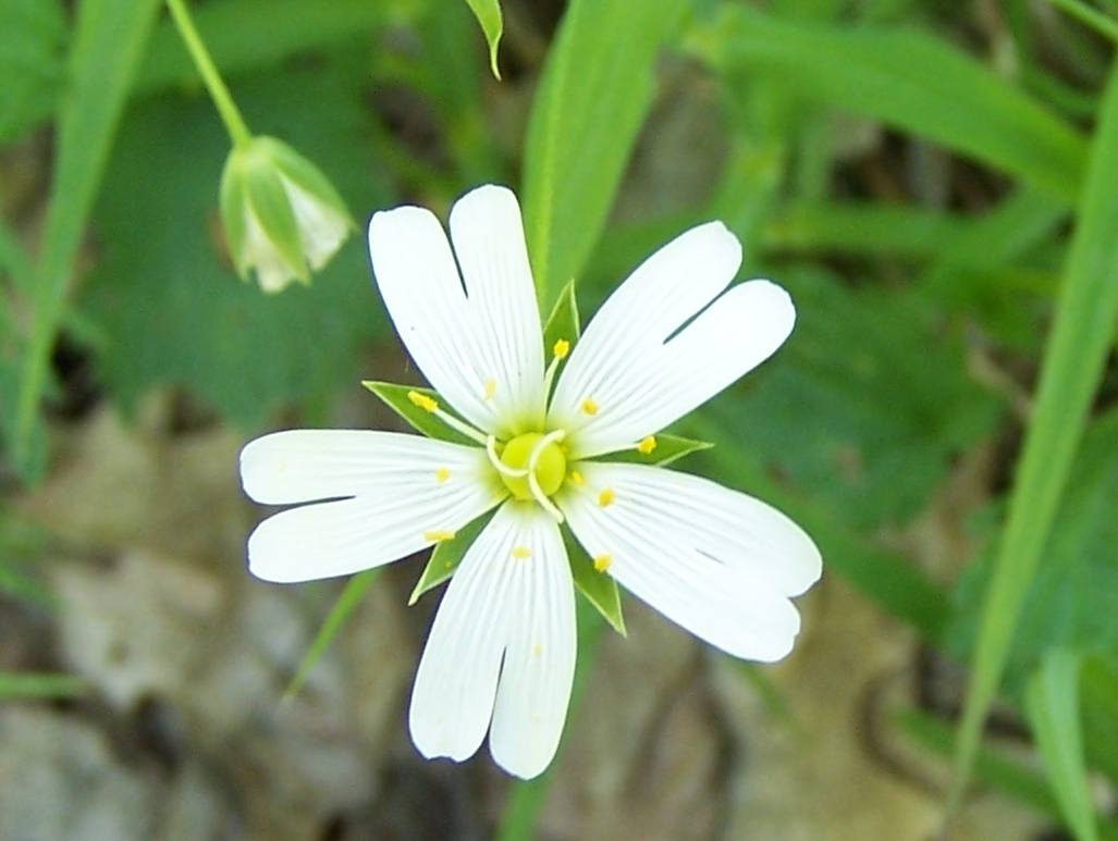 Stellaria holostea (pl. gwiazdnica wielkokwiatowa)